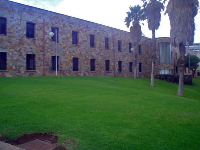 Vista de la facultad de filosofía (Univesridad de La Laguna)